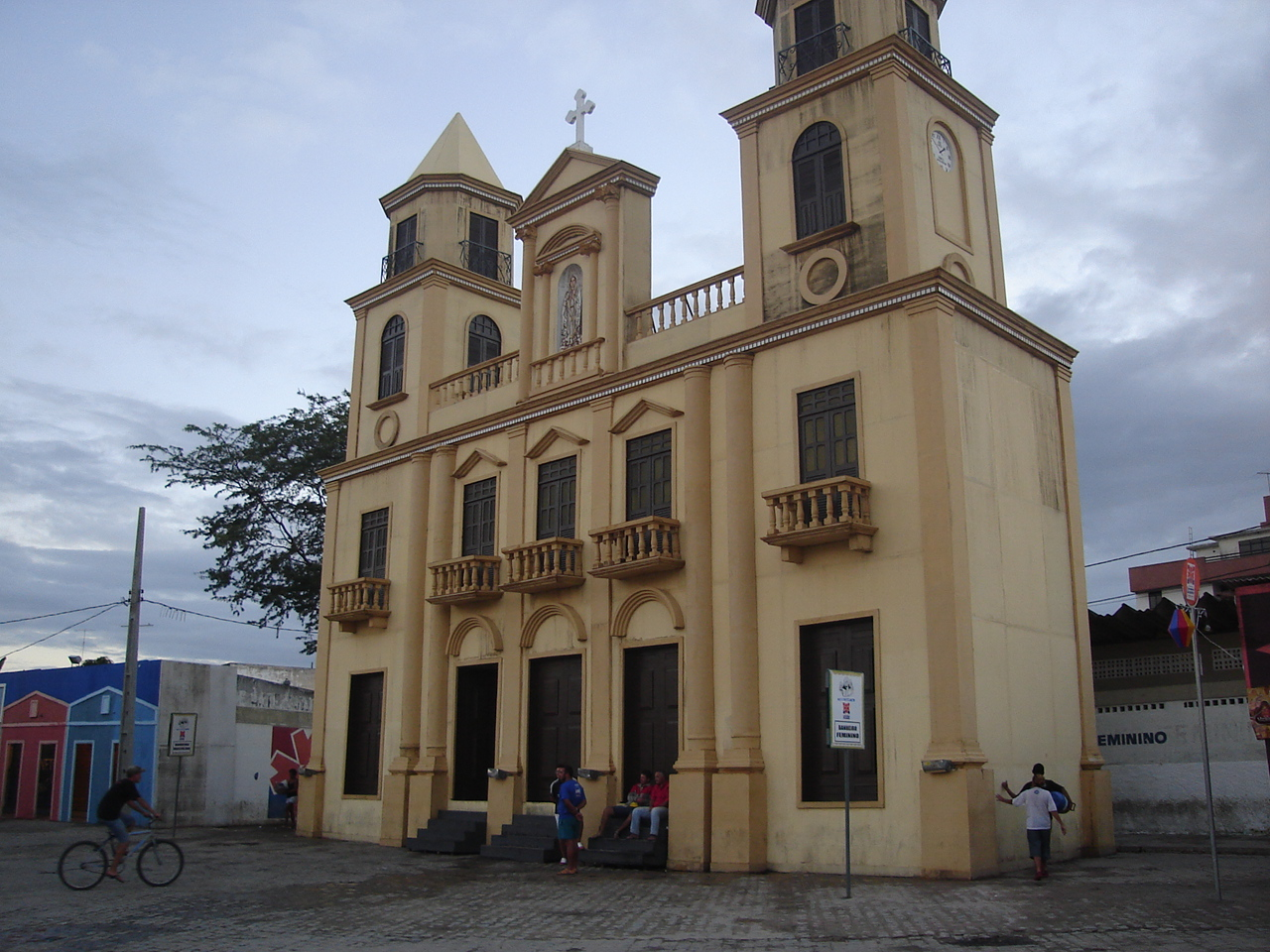 Réplica da Catedral de Campina Grande no evento O Maior Sao João do Mundo, Campina Grande - PB Ano: 2006. Author: Bruno Coitinho Araújo